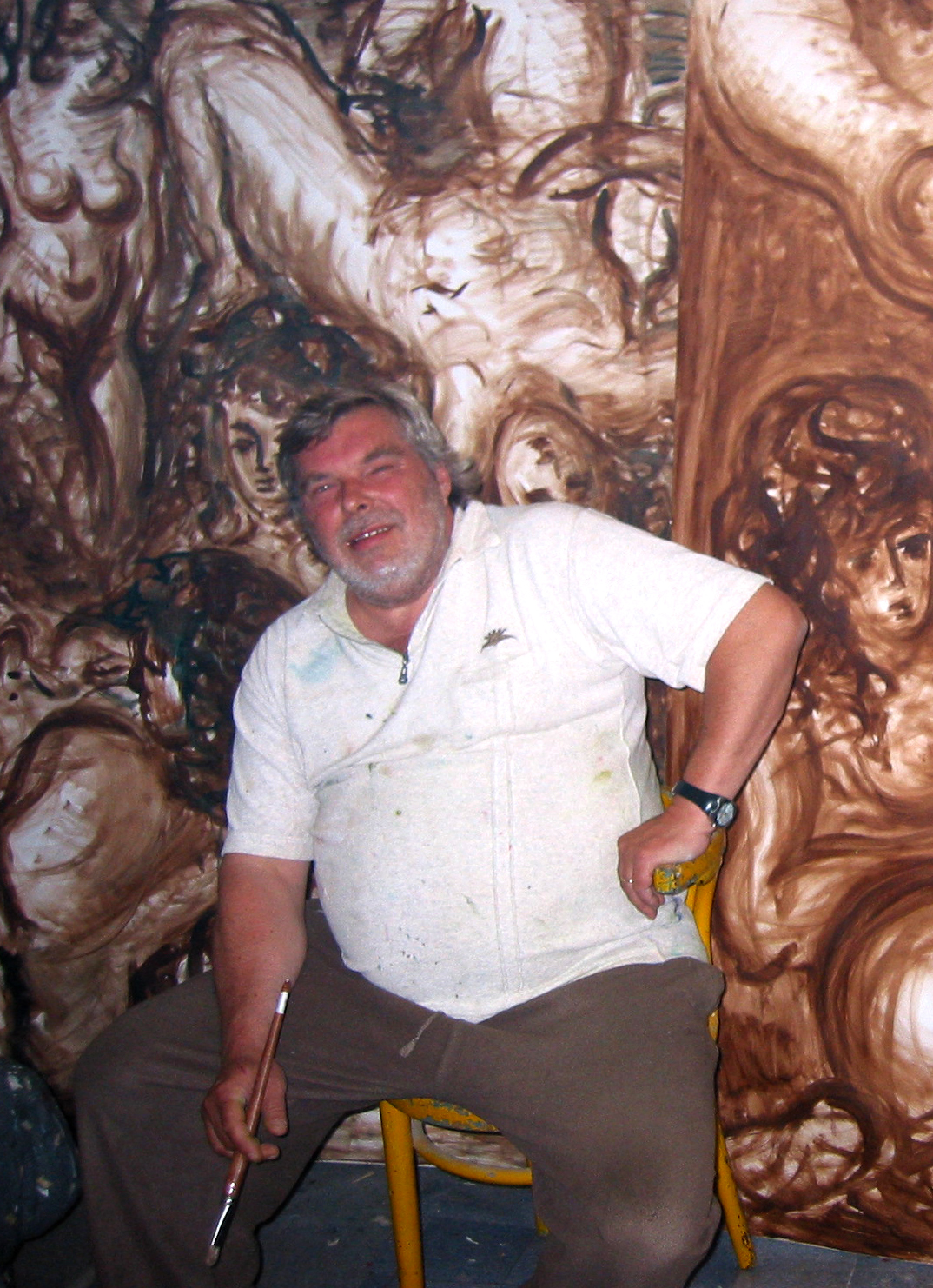 František Hanáček